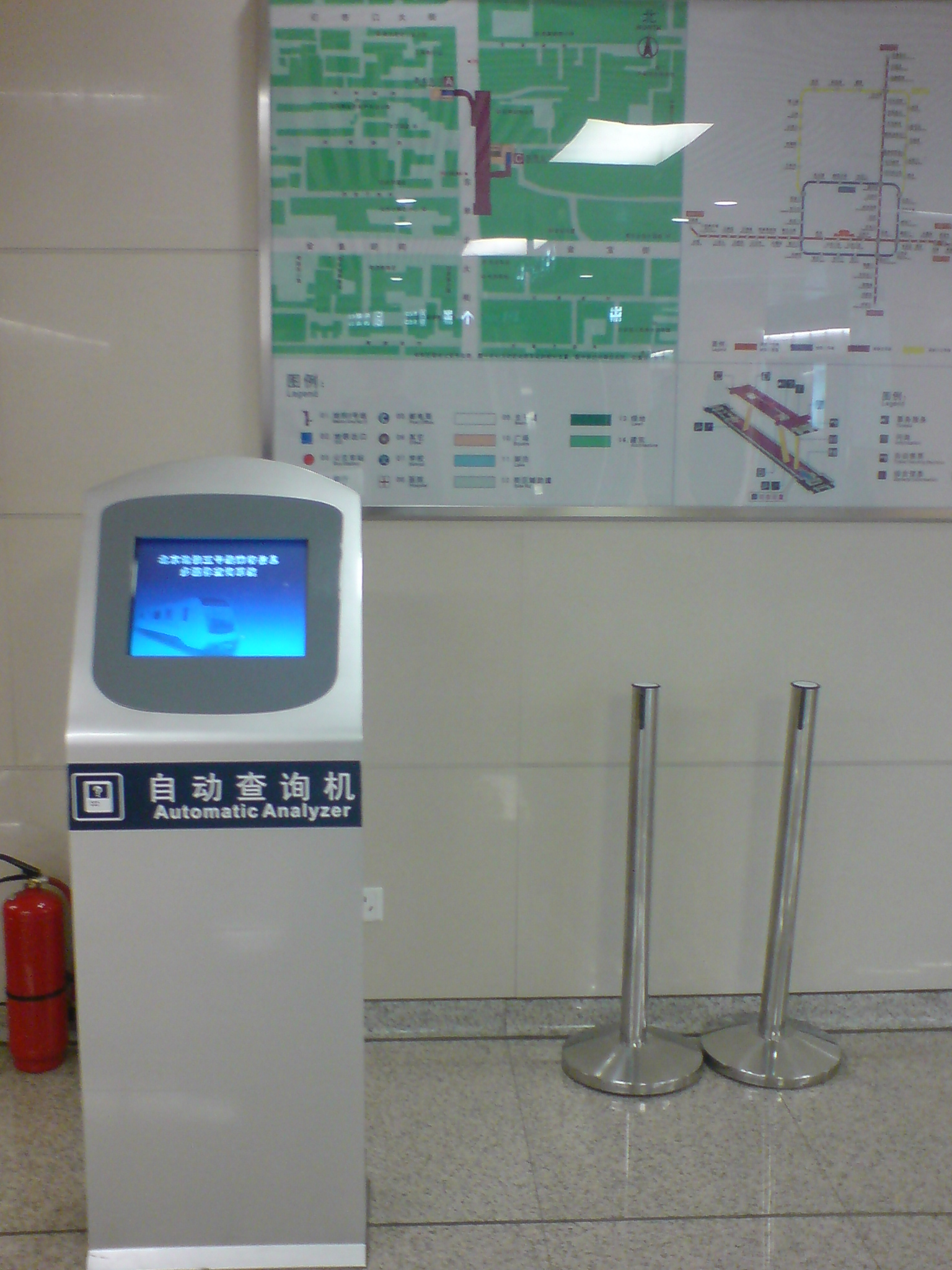 北京地铁5号线站内自动查询机